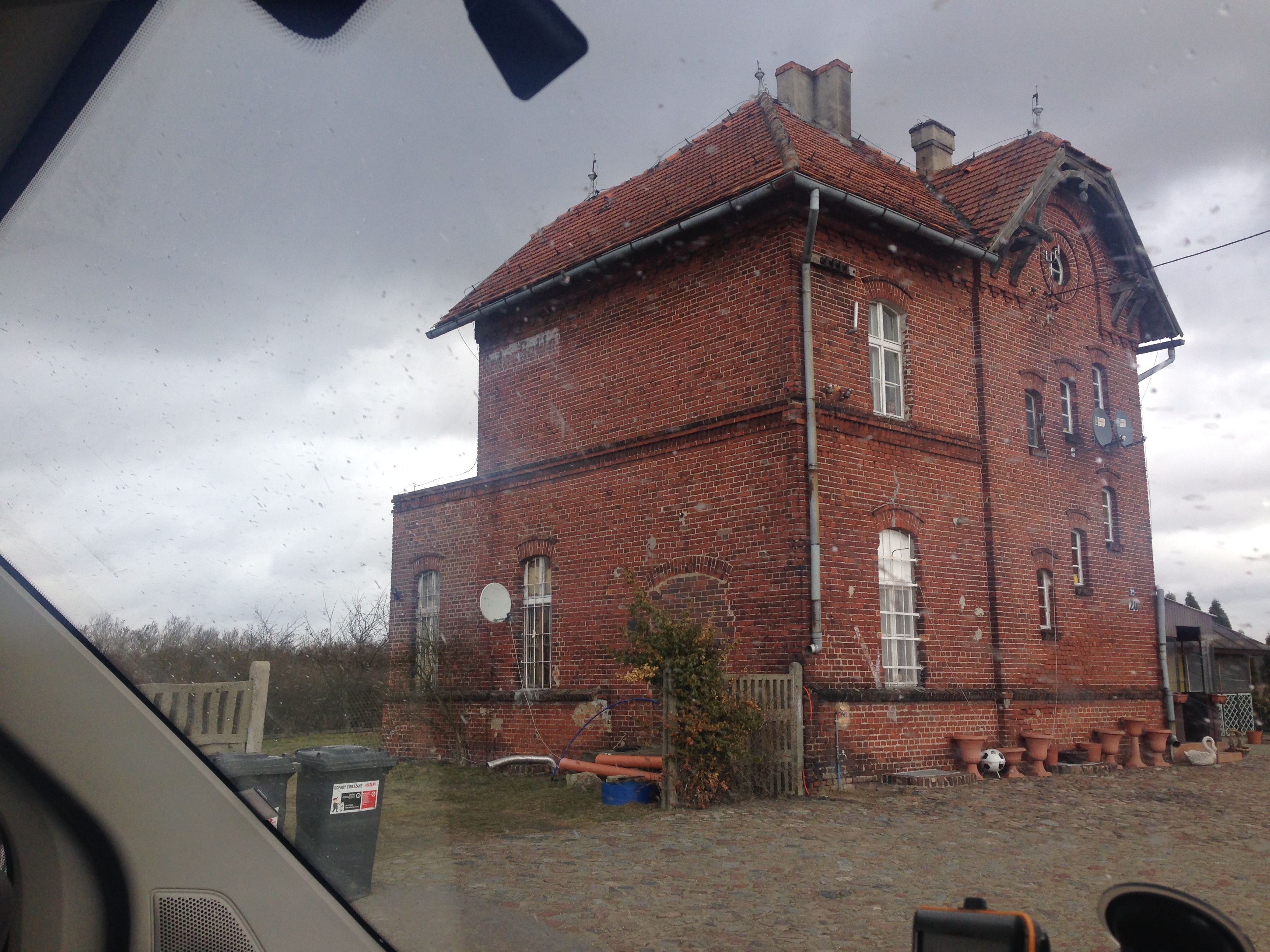 Niemiecka nazwa(Gross-Golle) widoczna na nie czynnym budynku stacyjnym w miejscowości Gołaszewo